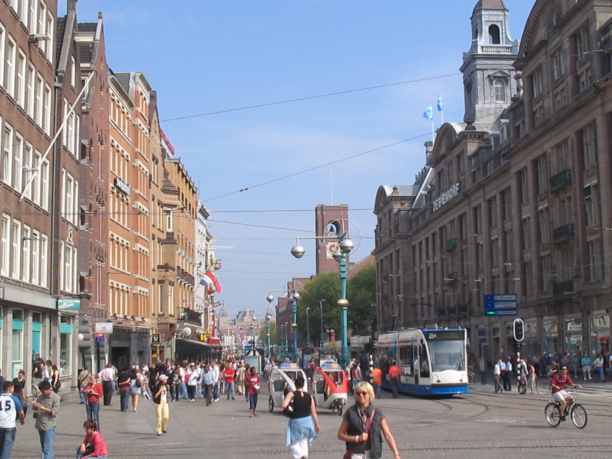 Damrak, Amsterdam. Sept. 2005